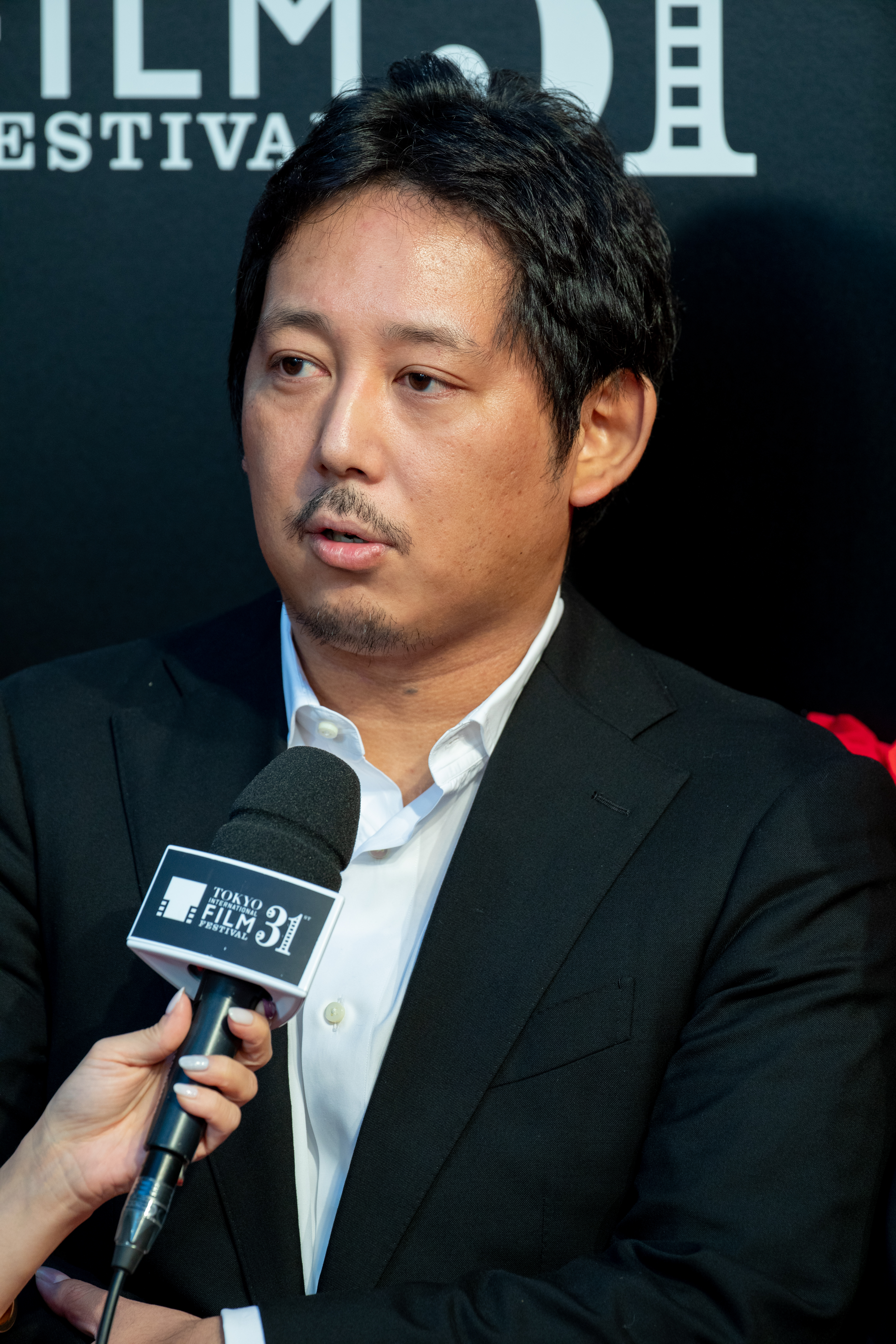 第30回 東京国際映画祭 オープニングセレモニー 入江悠 (ギャングース)